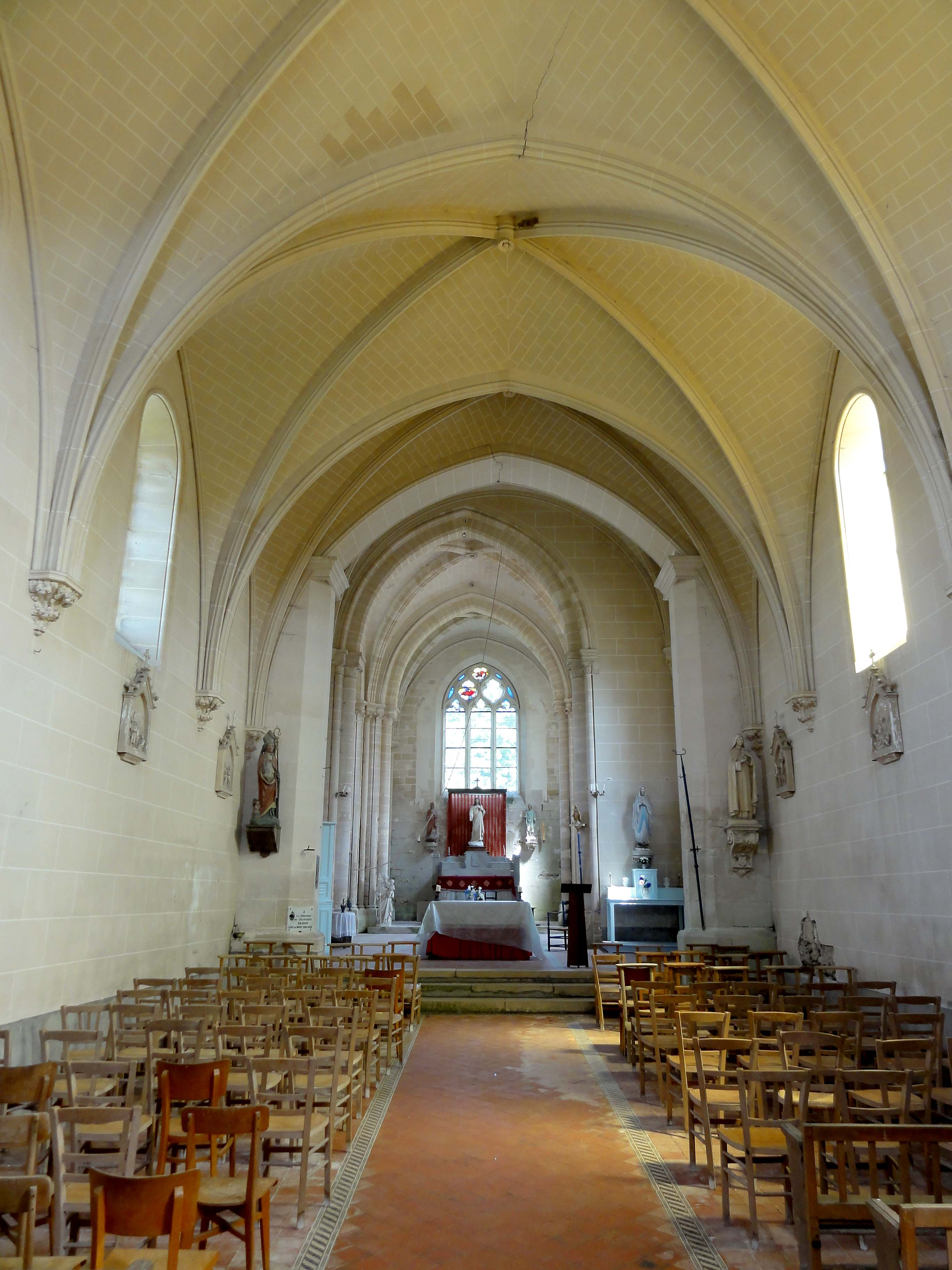 Intérieur de l'église Saint-Lucien d'Ansacq (voir titre).